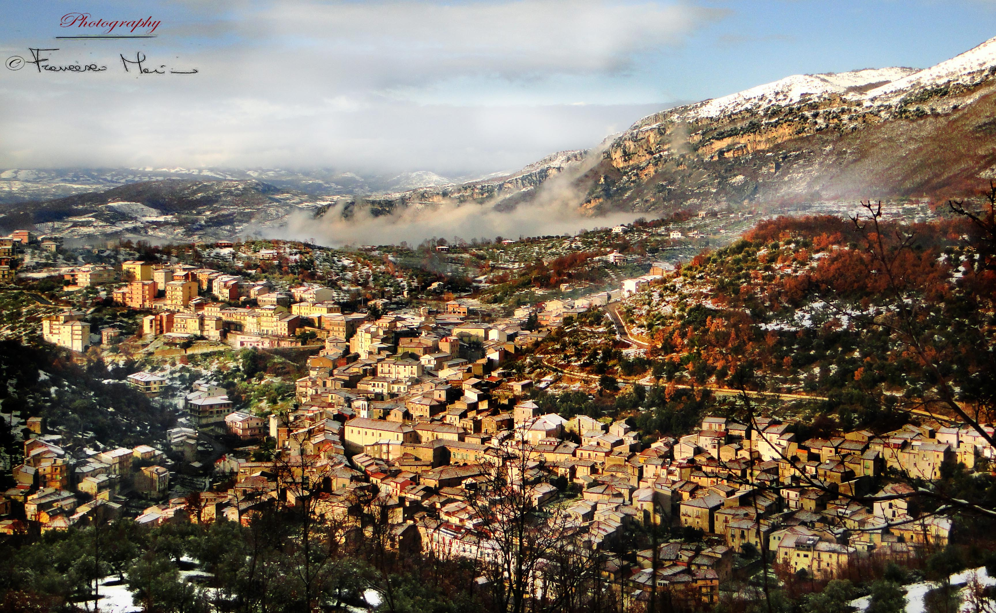 Piaggine (SA)